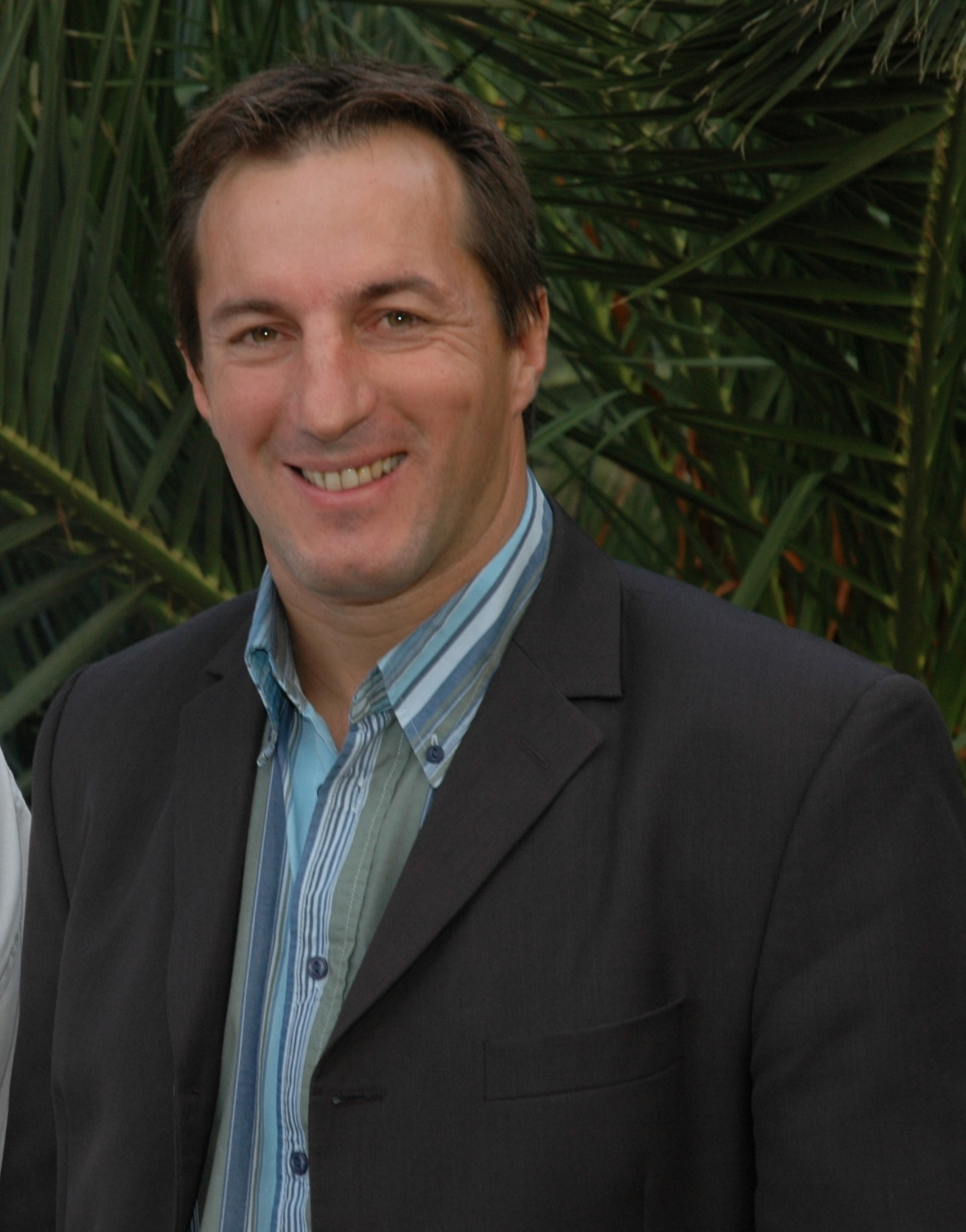 Le joueur de rugby à XV Philippe Sella en France (PACA) en juillet 2007